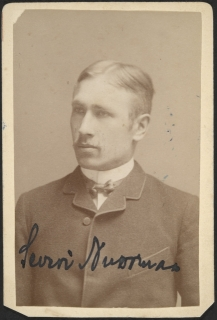 Severi Nuormaa